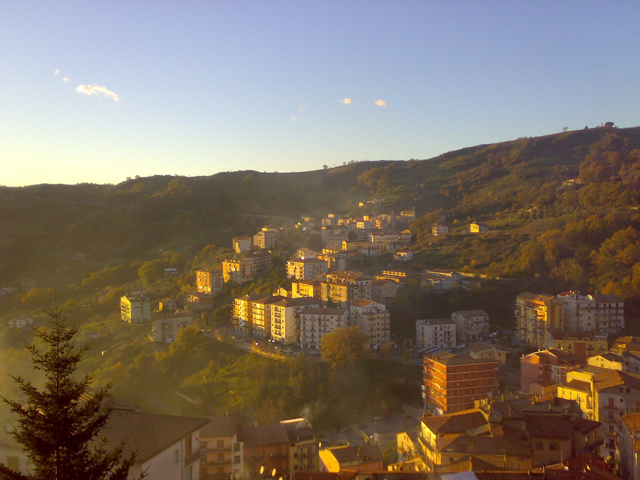 Panorama di Verbicaro